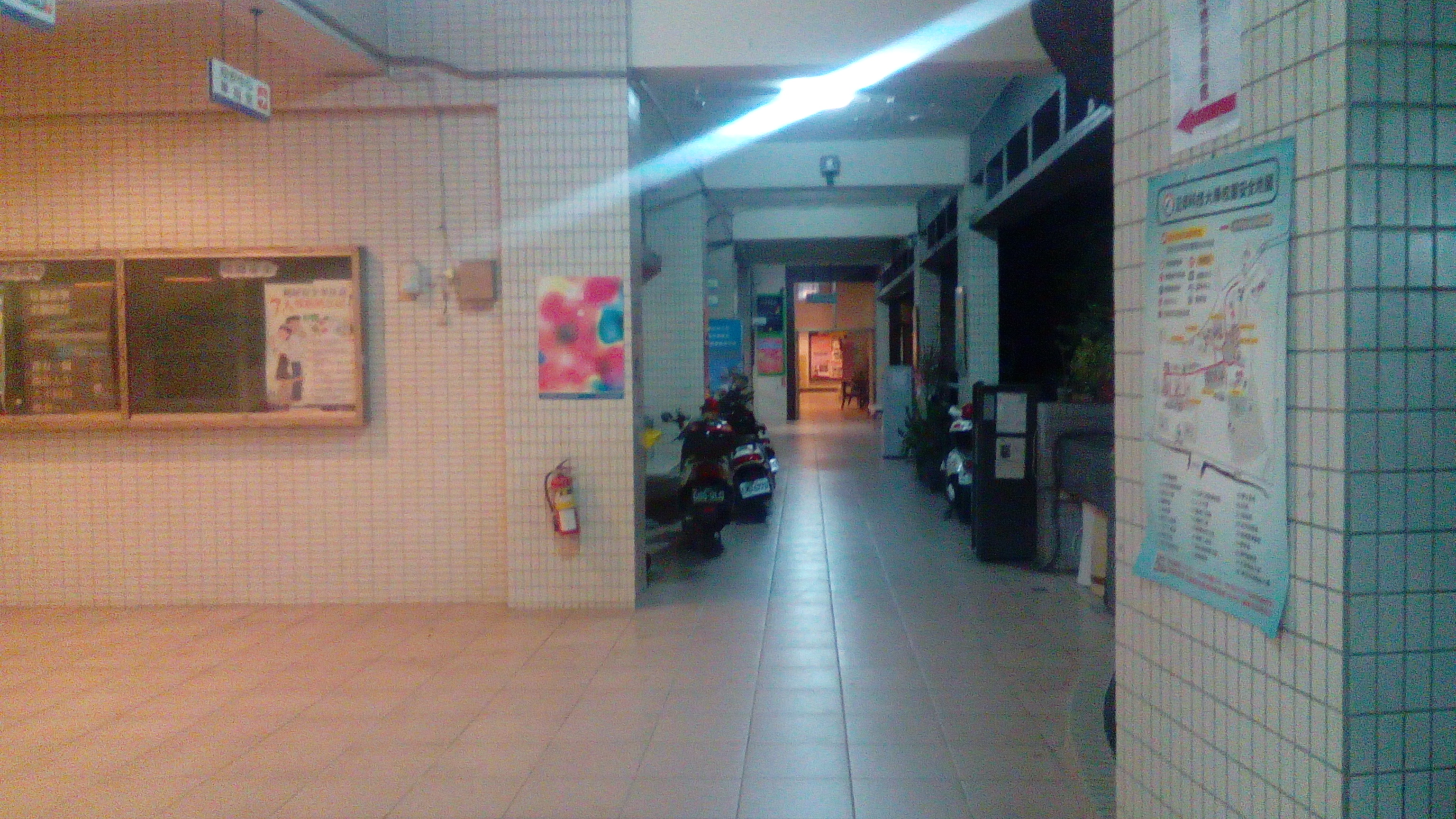 1樓，軍訓教官室旁